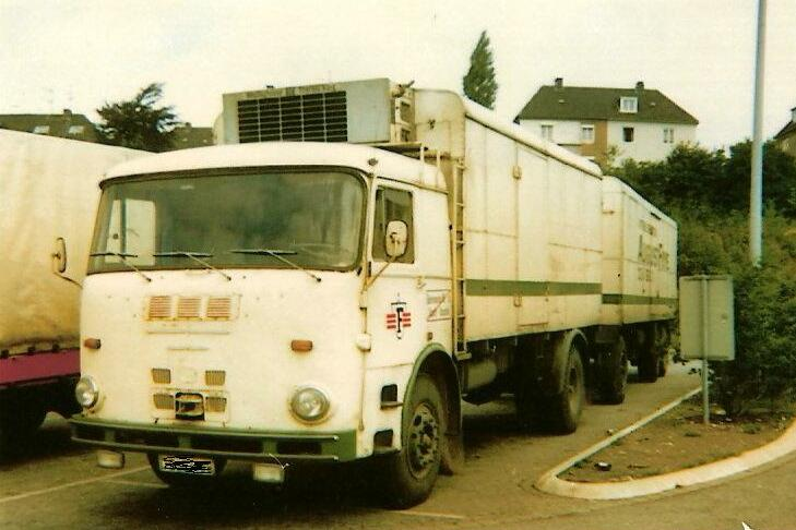 Büssing Commondore U 11 D Bj. 67, Büssing&Sohn Fahrerhaus, 11580 Hubr., 210 PS (erloschene Firma)